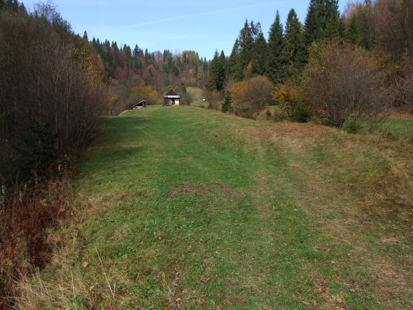 Chłapkowa Polana w Gorcach (dolina Łopuszanki)